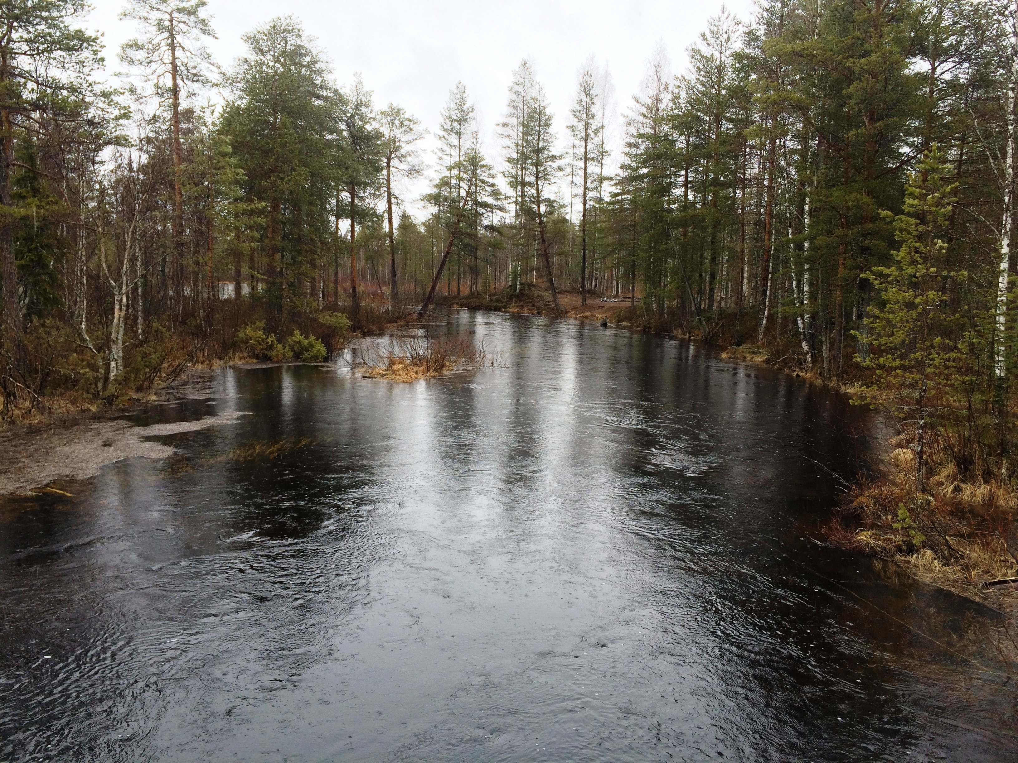 река Волома